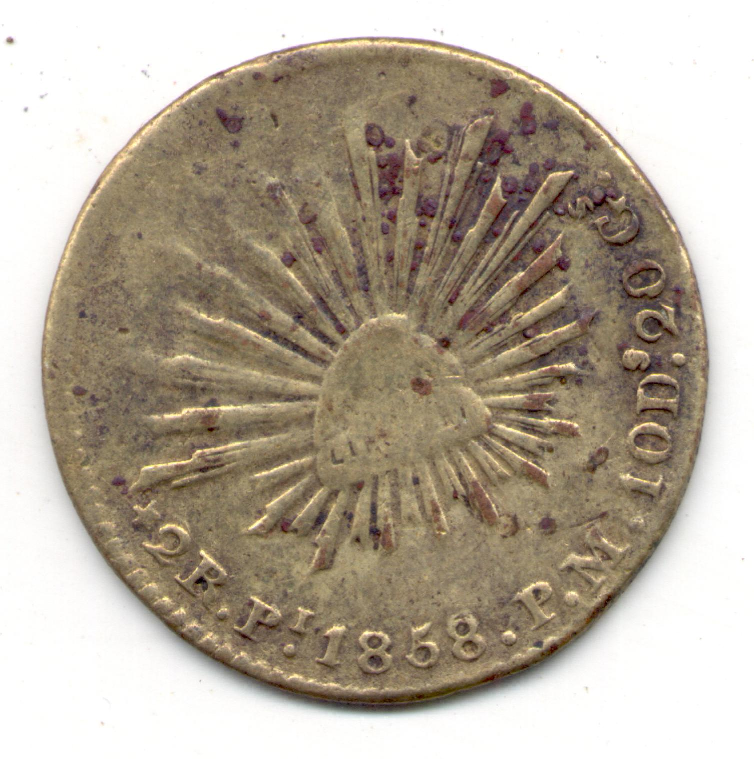 Moneda falsa de latón de 2 reales presuntamente acuñada en San Luis Potosí, México en 1858.